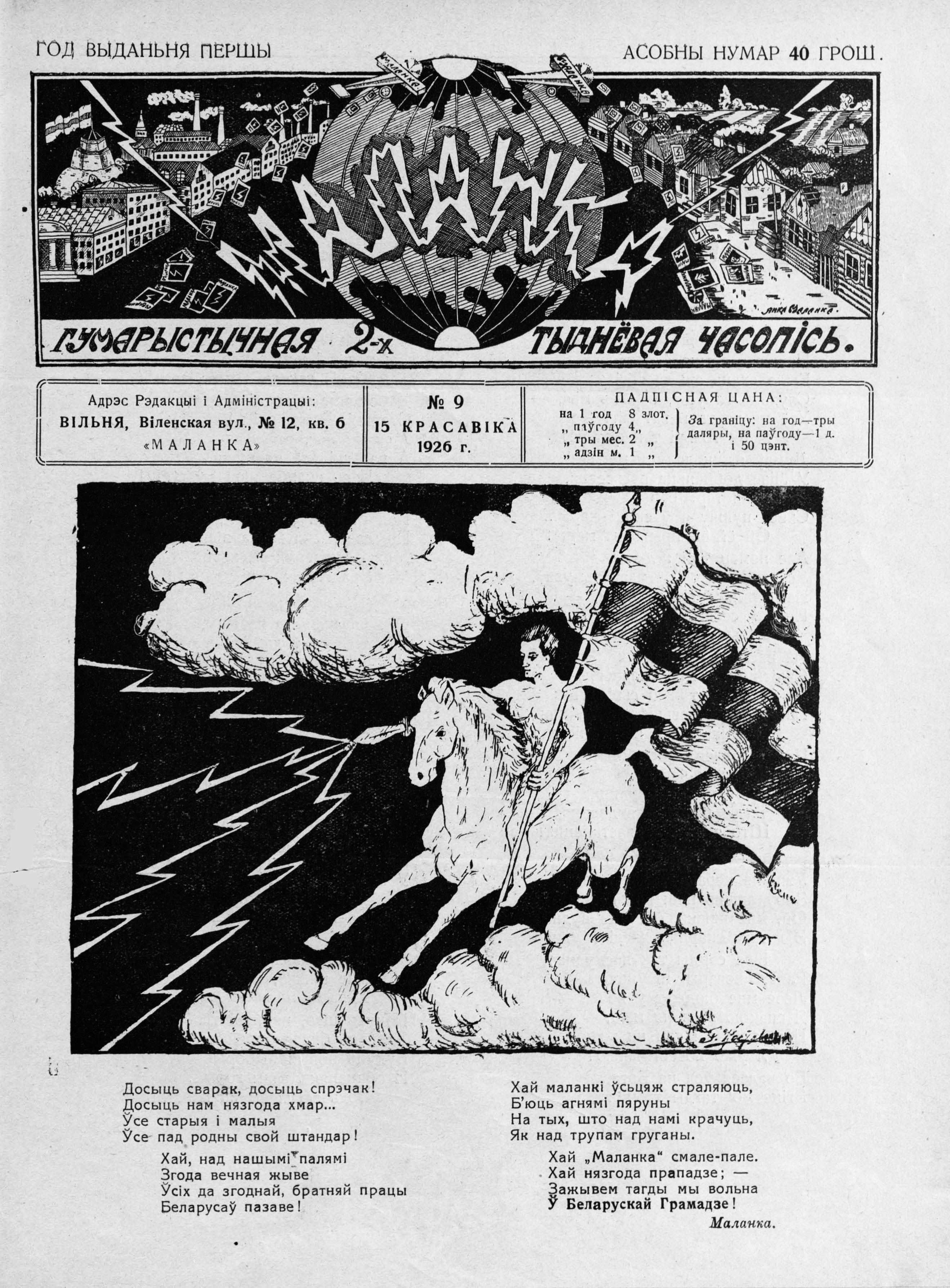 Беларуская (тарашкевіца): Вокладка часопіса Маланка №9, 1926 г.